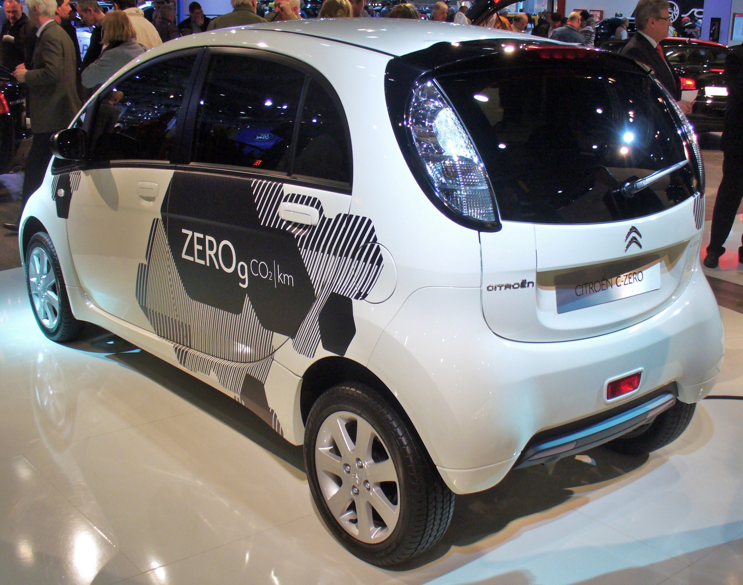 Citroen C-Zero